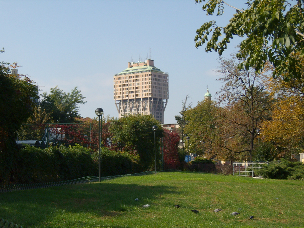 I giardini di via San Barnaba a Milano. Sullo sfondo la Torre Velasca